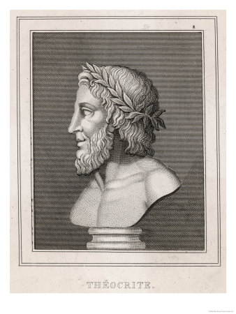 Stampa ritratto Teocrito